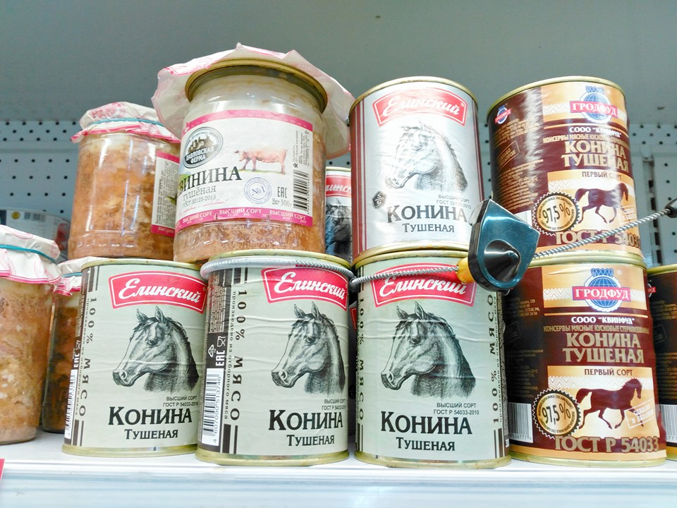 At eti konservesi